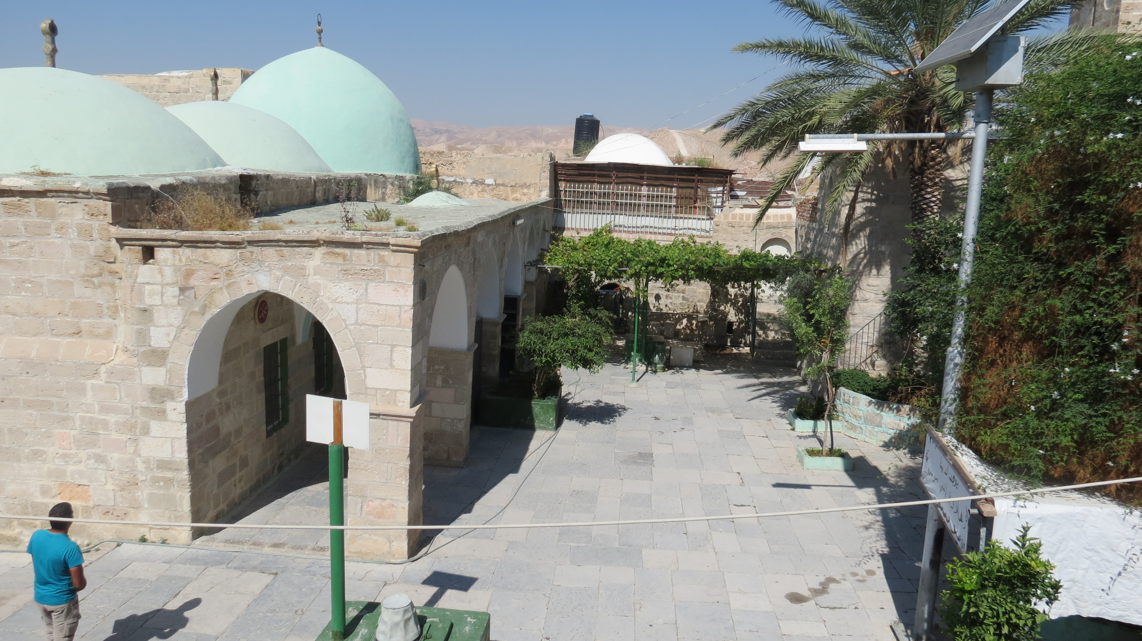 Nabi Musa נבי מוסא